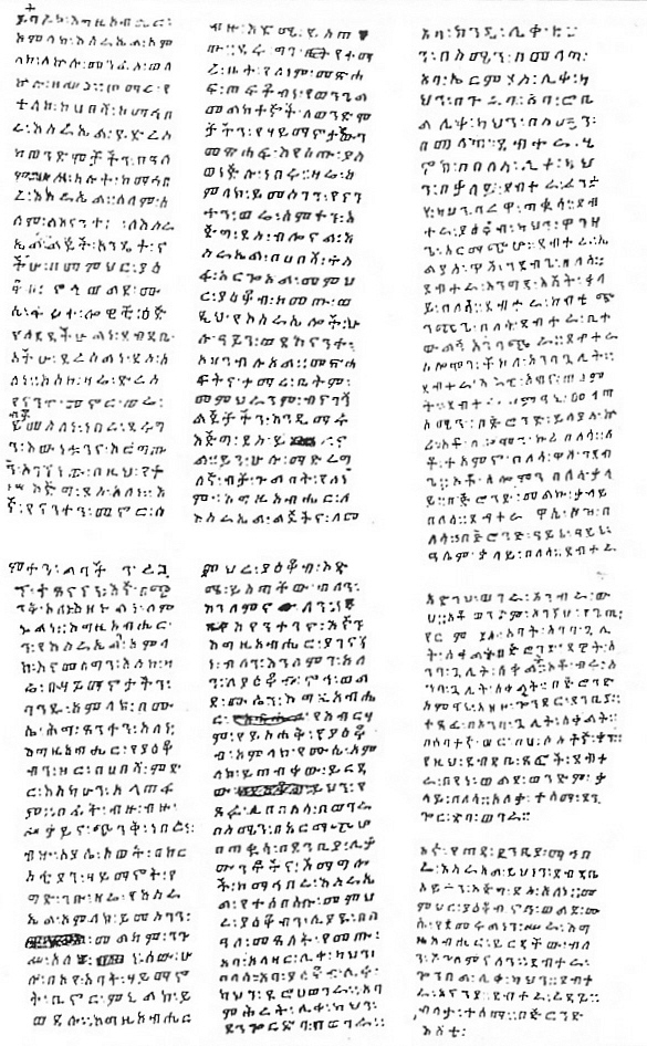 איגרת חכמי ביתא ישראל אל קהילות ישראל, אוקטובר 1908 (תשרי ה'תרס"ט)